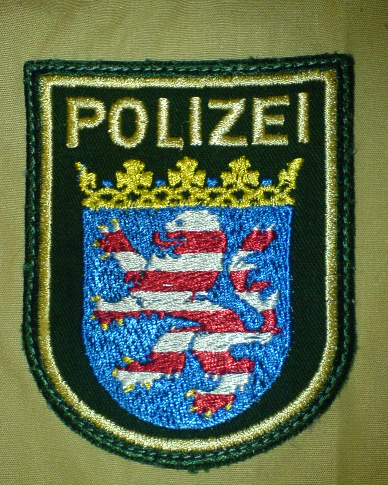 Ärmelabzeichen der Hessischen Polizei